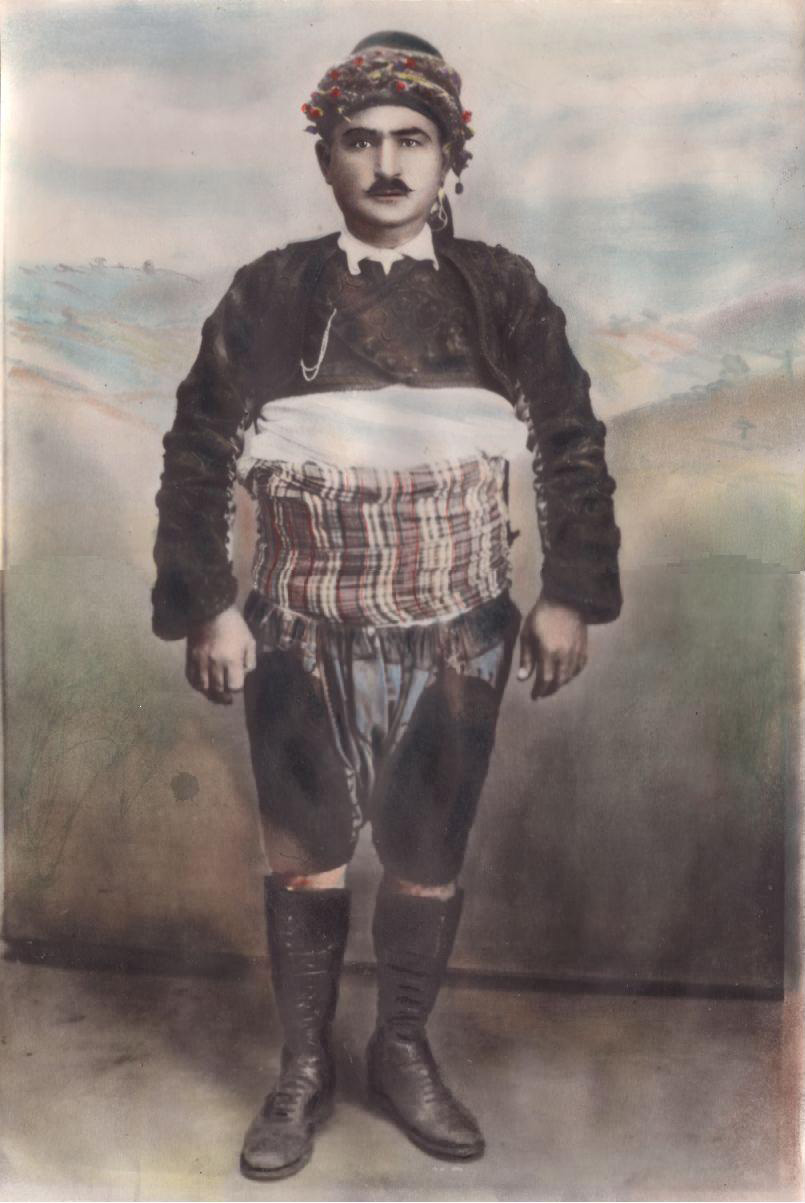 Mestan Efe